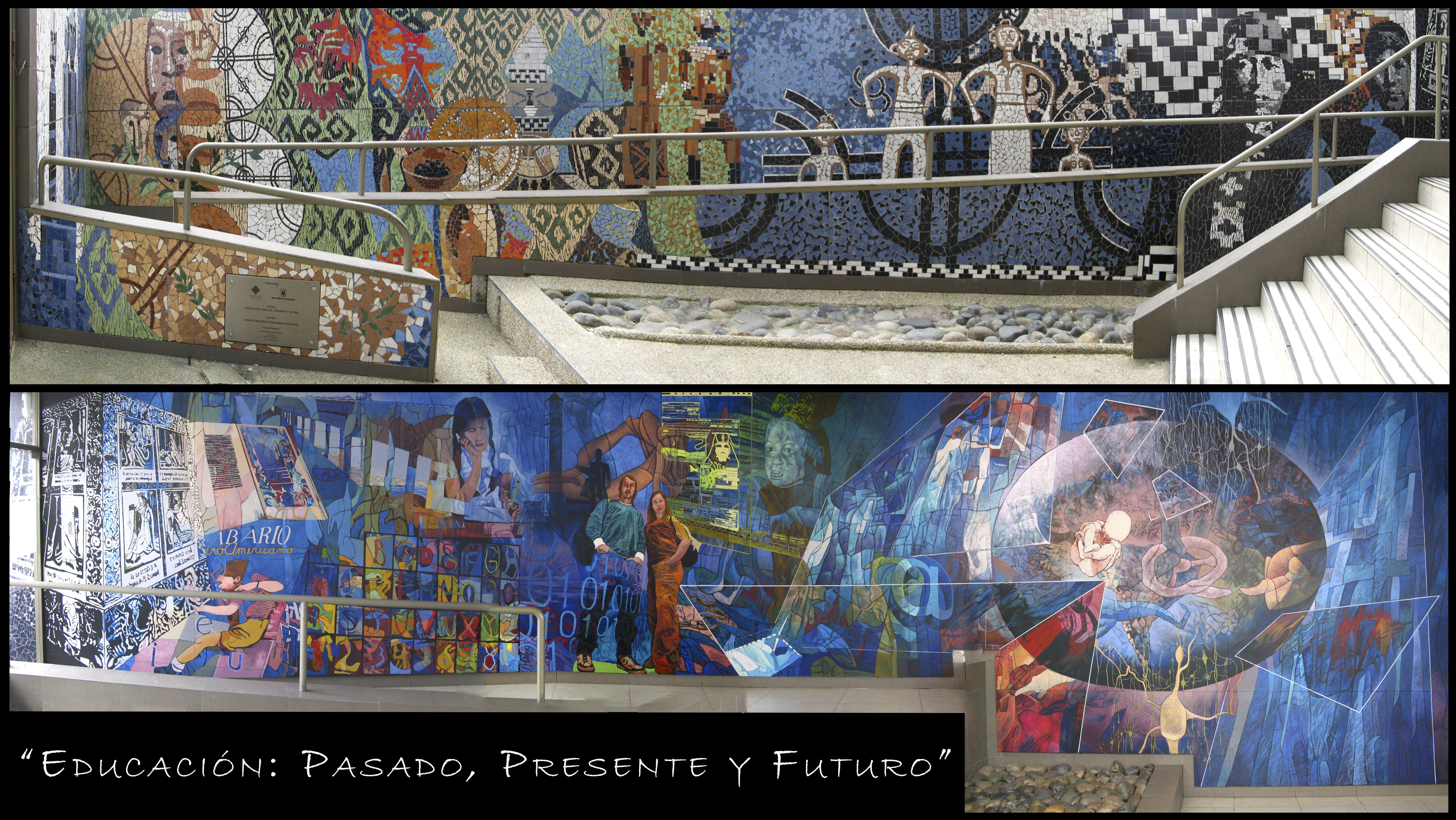 Mural "Educación: pasado, presente y futuro" (2009) de Marco Antonio Hernández Albarrán. Parte exterior (arriba) e interior (abajo). Concepción, Chile. Agosto de 2012.